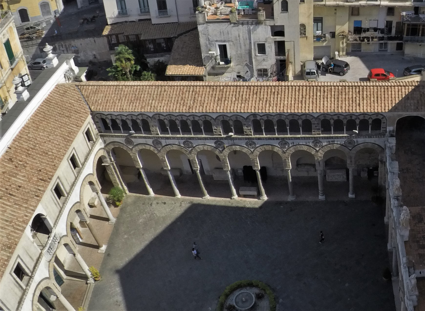 Vista del quadriportico dal campanile